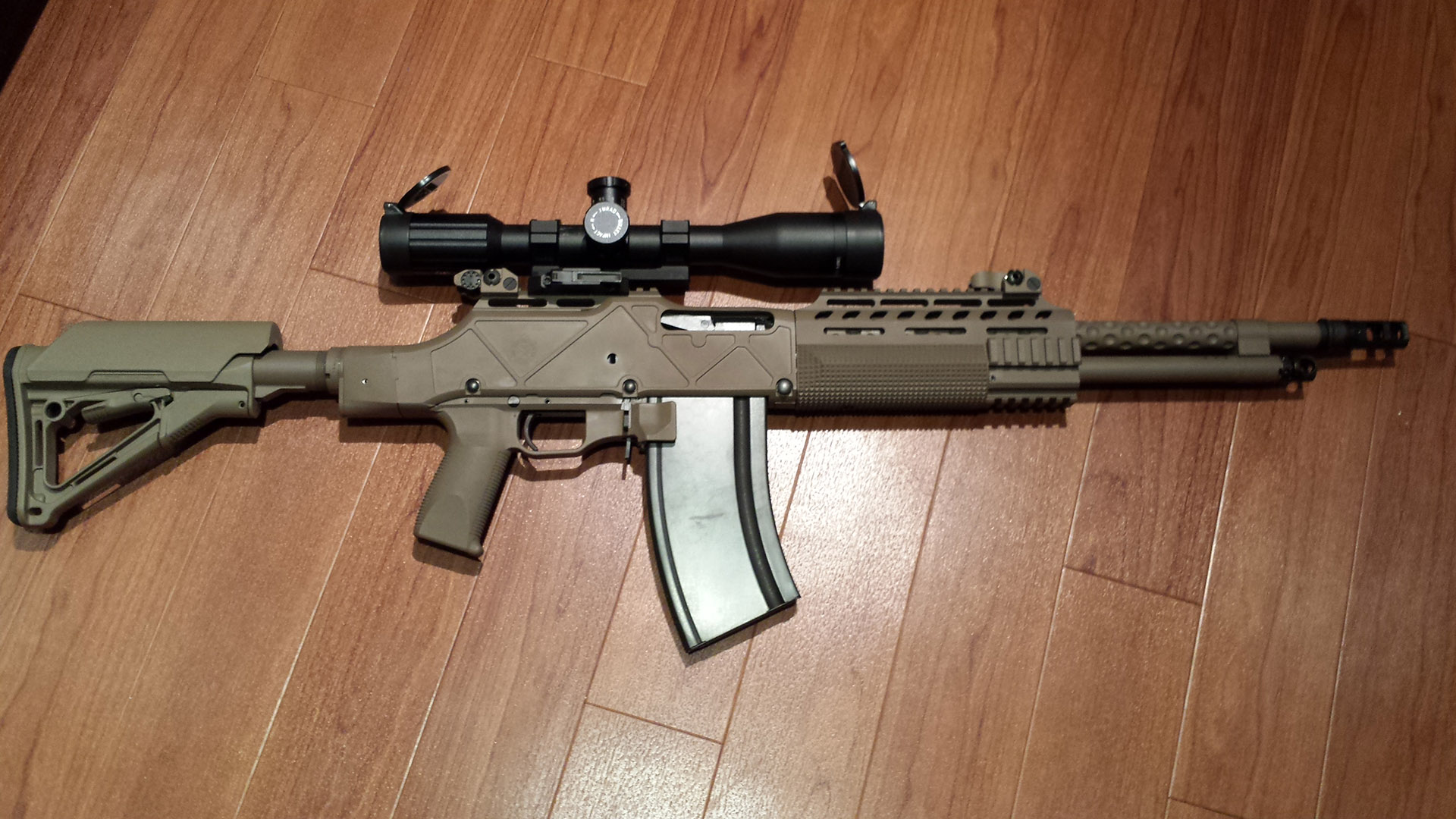 Heavy Combat Assault Rifle